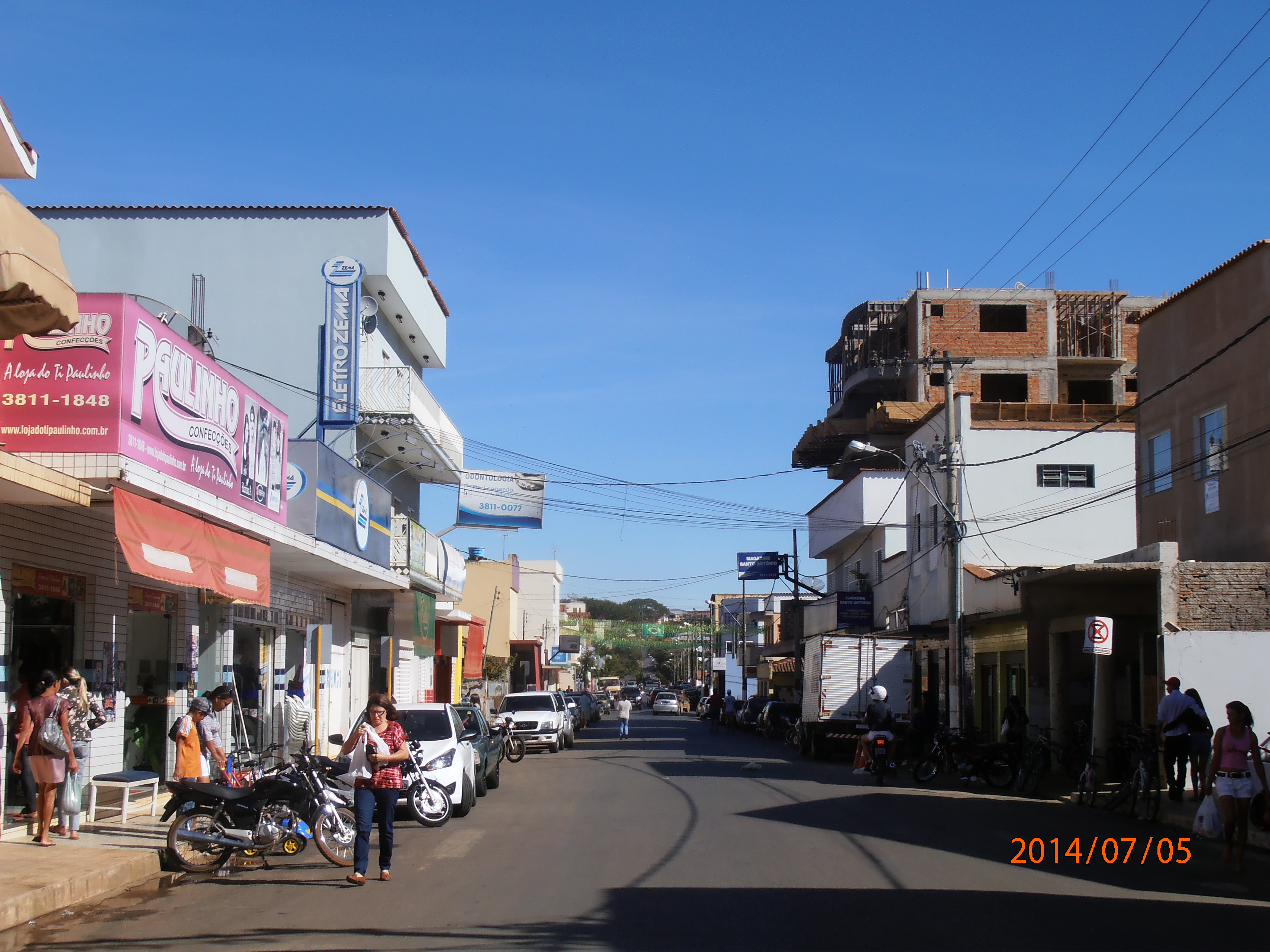 Presidente Olegario MG Brasil - Centro